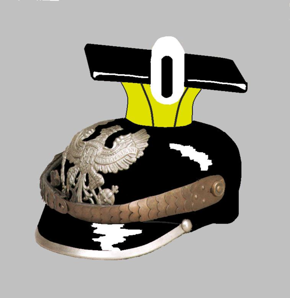 Preußische Tschapka der Ulanen